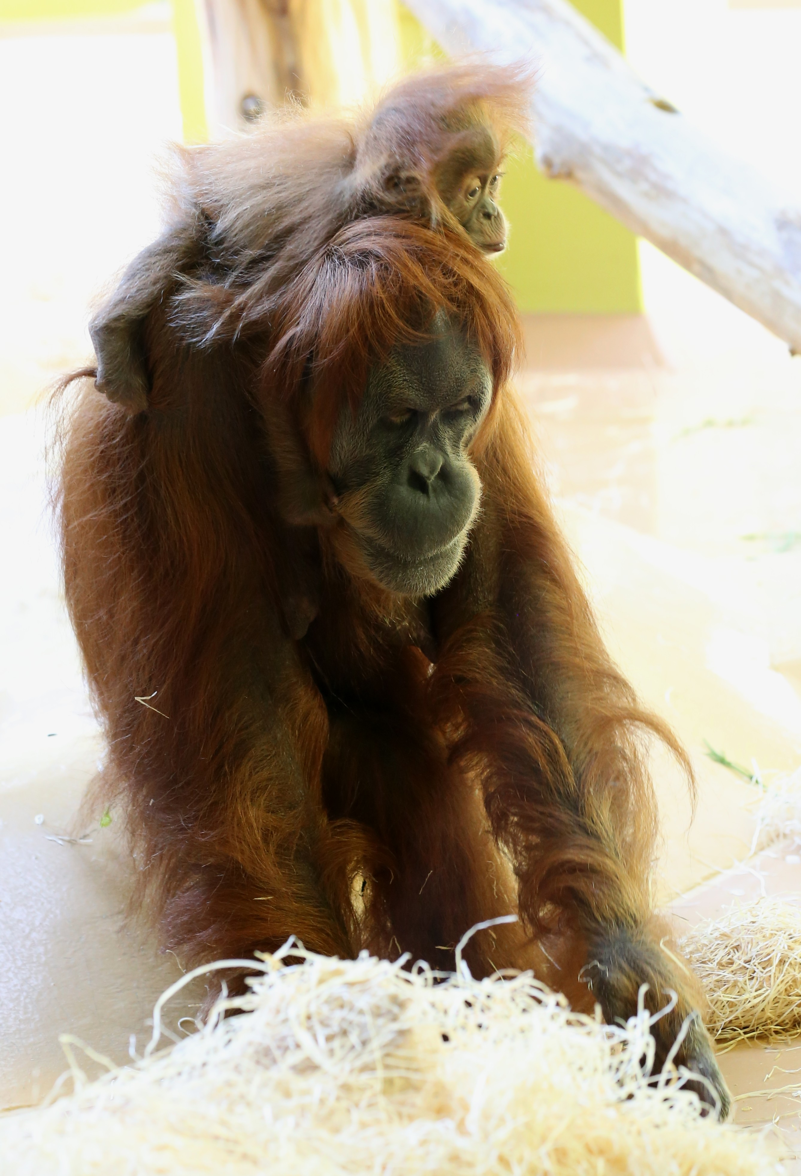 Sumatra-Orang-Utan (Pongo pygmaeus abeli), Tierpark Hellabrunn, München